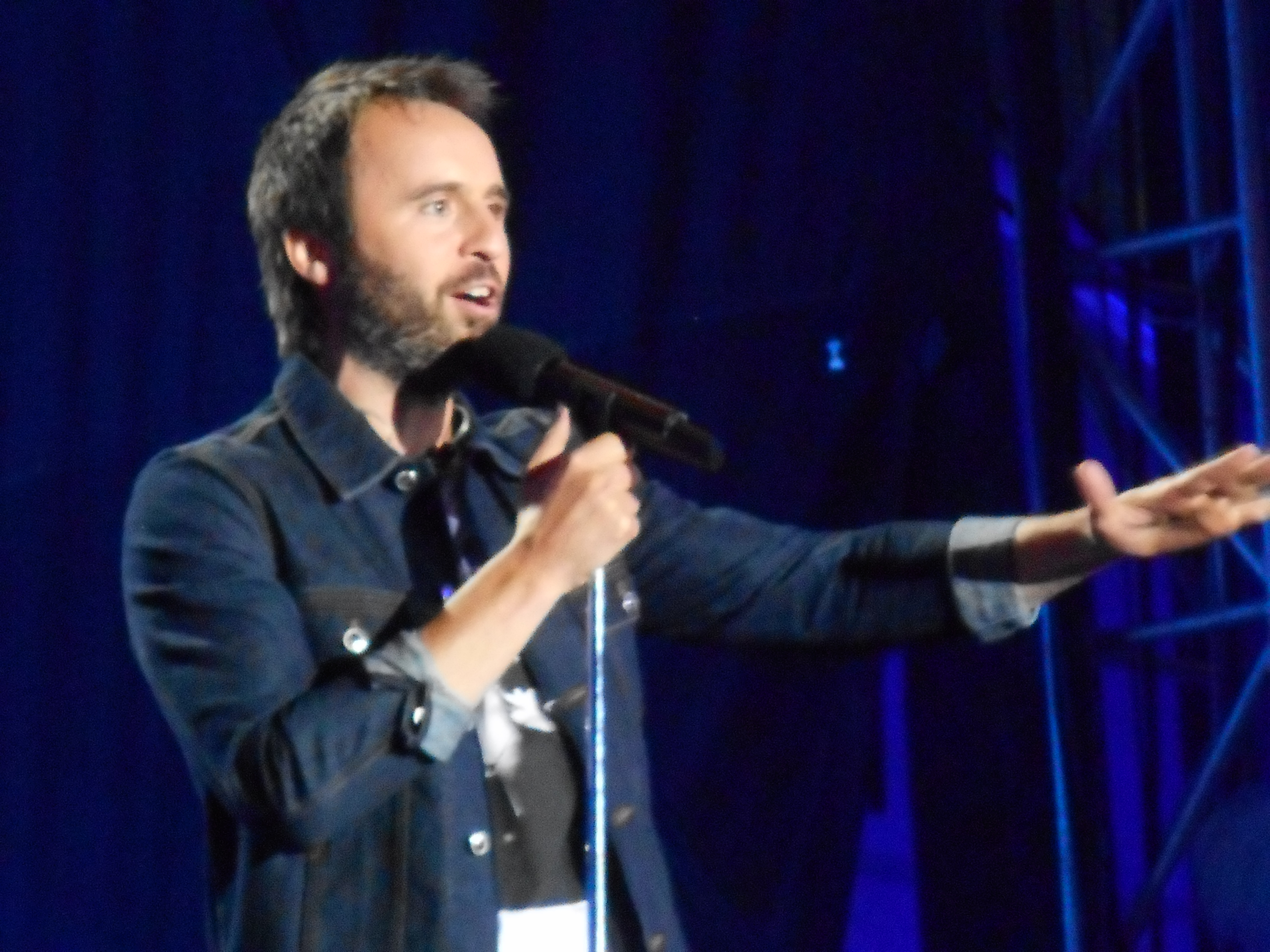 Fête nationale du Québec à Montréal, place des Festivals